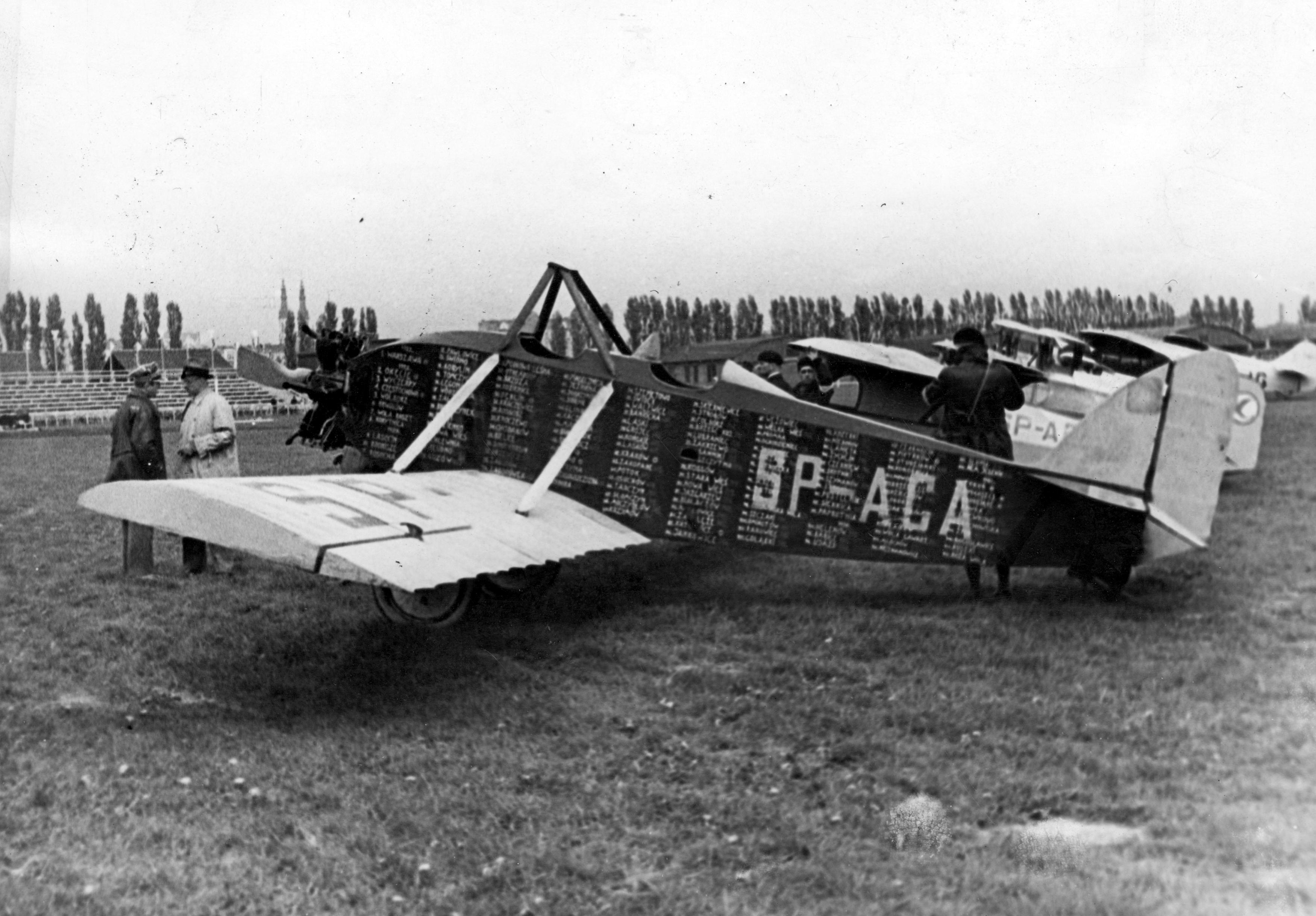 Awionetka J.D.-2 zbudowana w 1927r. przez sekcję samolotową Politechniki Warszawskiej, własność kpt. Babińskiego - grupa awionetek podczas przeglądu samolotów polskiej konstrukcji dokonanej przez min. Butkiewicza.